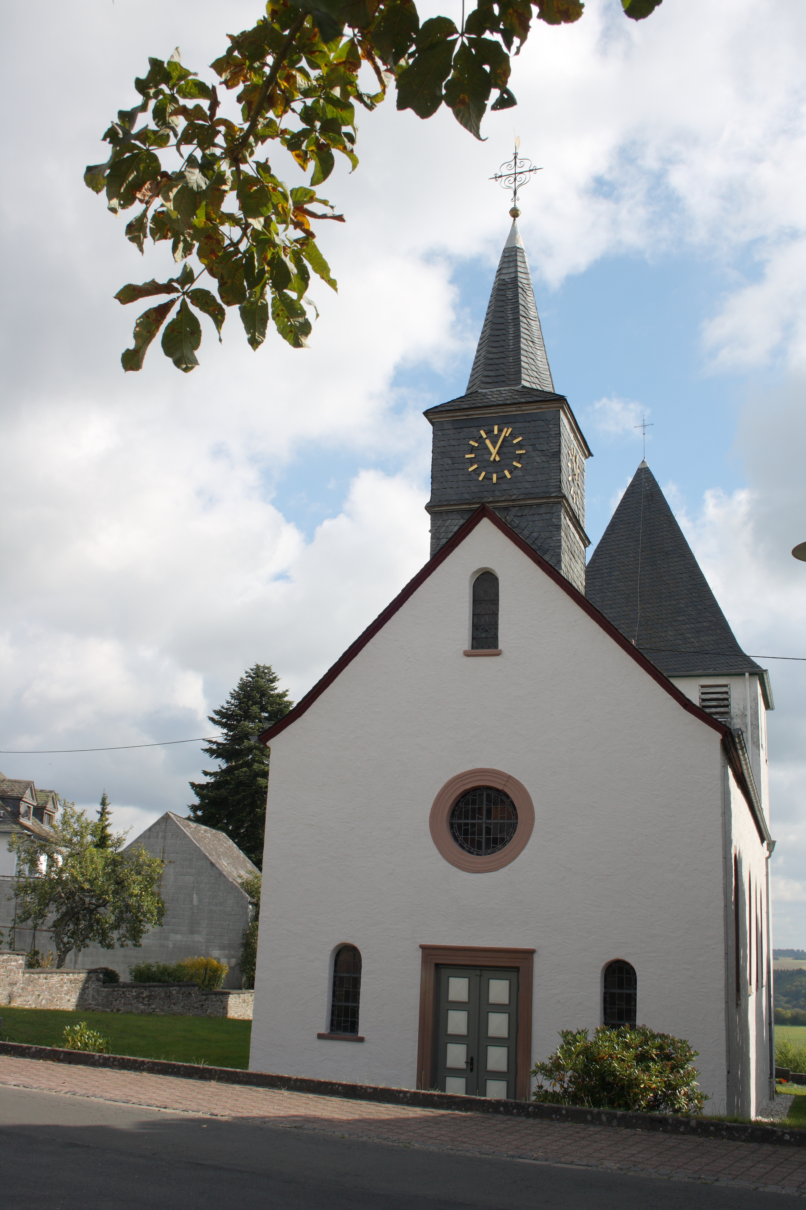 katholische Filialkirche in Bleckhausen im Landkreis Vulkaneifel (Rheinland-Pfalz)